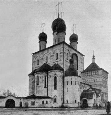 Собор во имя Феодоровской иконы Божией Матери и Святого благоверного князя Александра Невского в память 300-летия царствования Дома Романовых, который сооружался по почину Союза Русского Народа. Адрес: Товарный пер., 15, угол Миргородской ул., близ Николаевского (Московского) вокзала в Санкт-Петербурге)